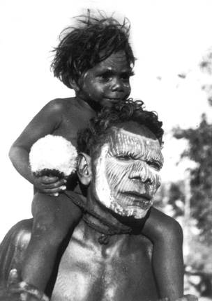 Aboriginer från Australien